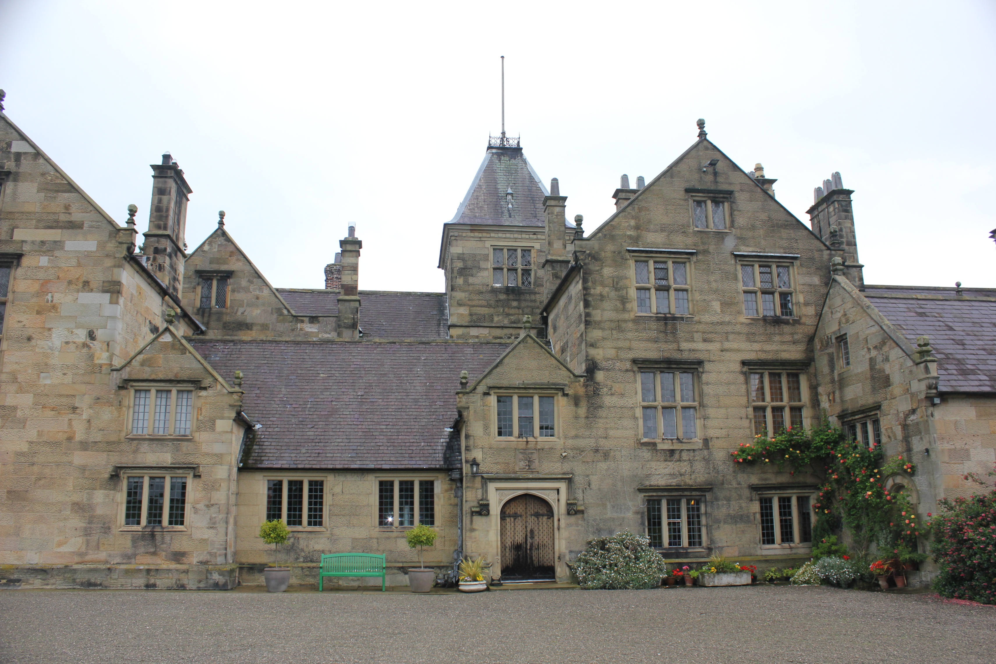 Mostyn Hall